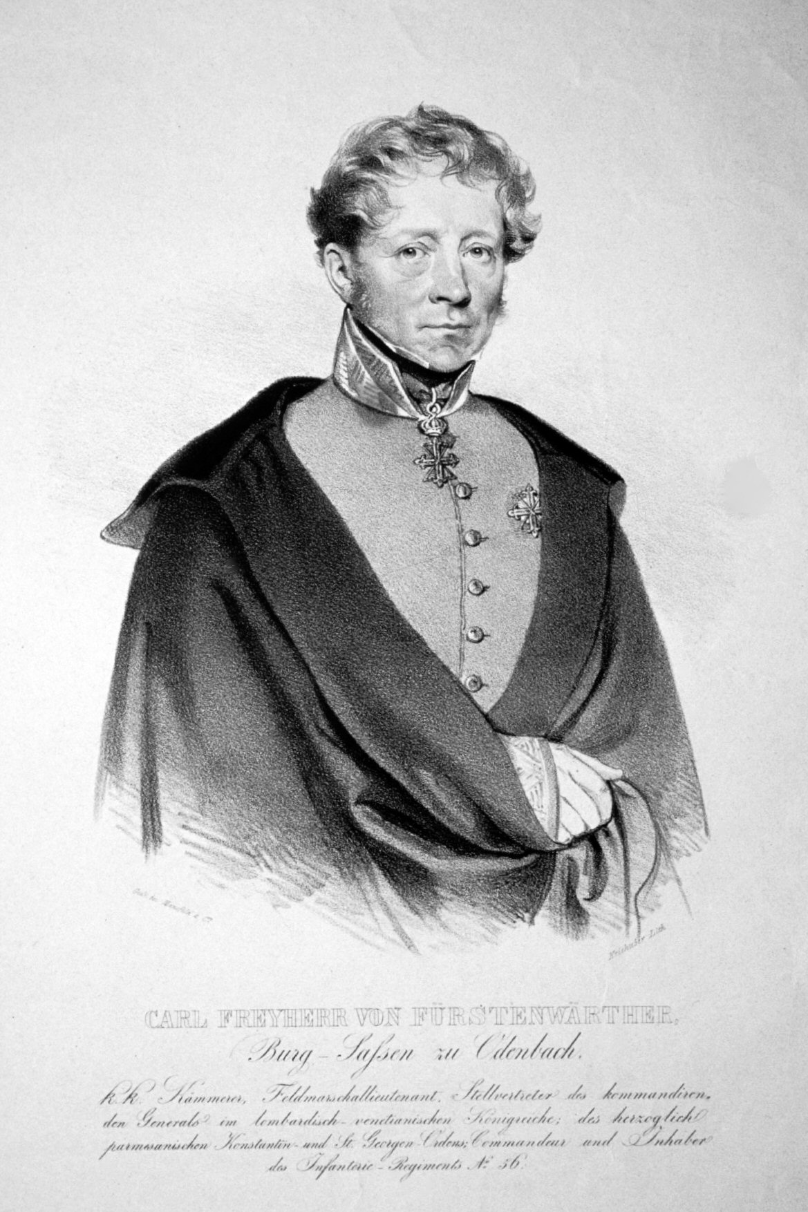 Friedrich Karl Freiherr von Fürstenwaerther (1769-1856), k. k. Feldmarschallleutnant, Geheimrat, Kapitän der Arcierenleibgarde. Lithographie von Josef Kriehuber, um 1830